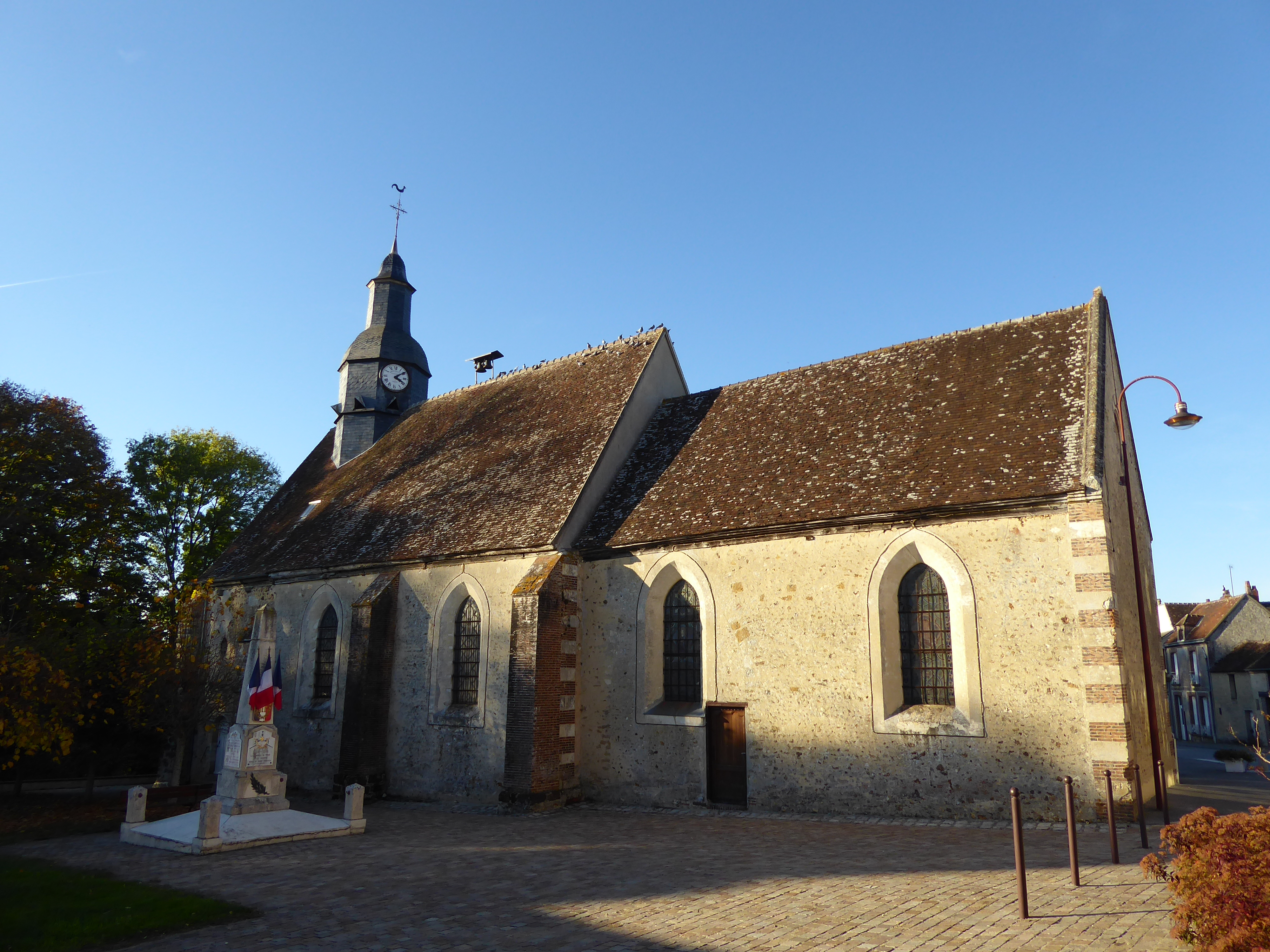 Église et monument aux morts du Mage, dans l'Orne.